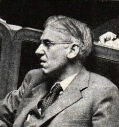 Nils Herlitz, riksdagsman för Högerpartiet, 1948.